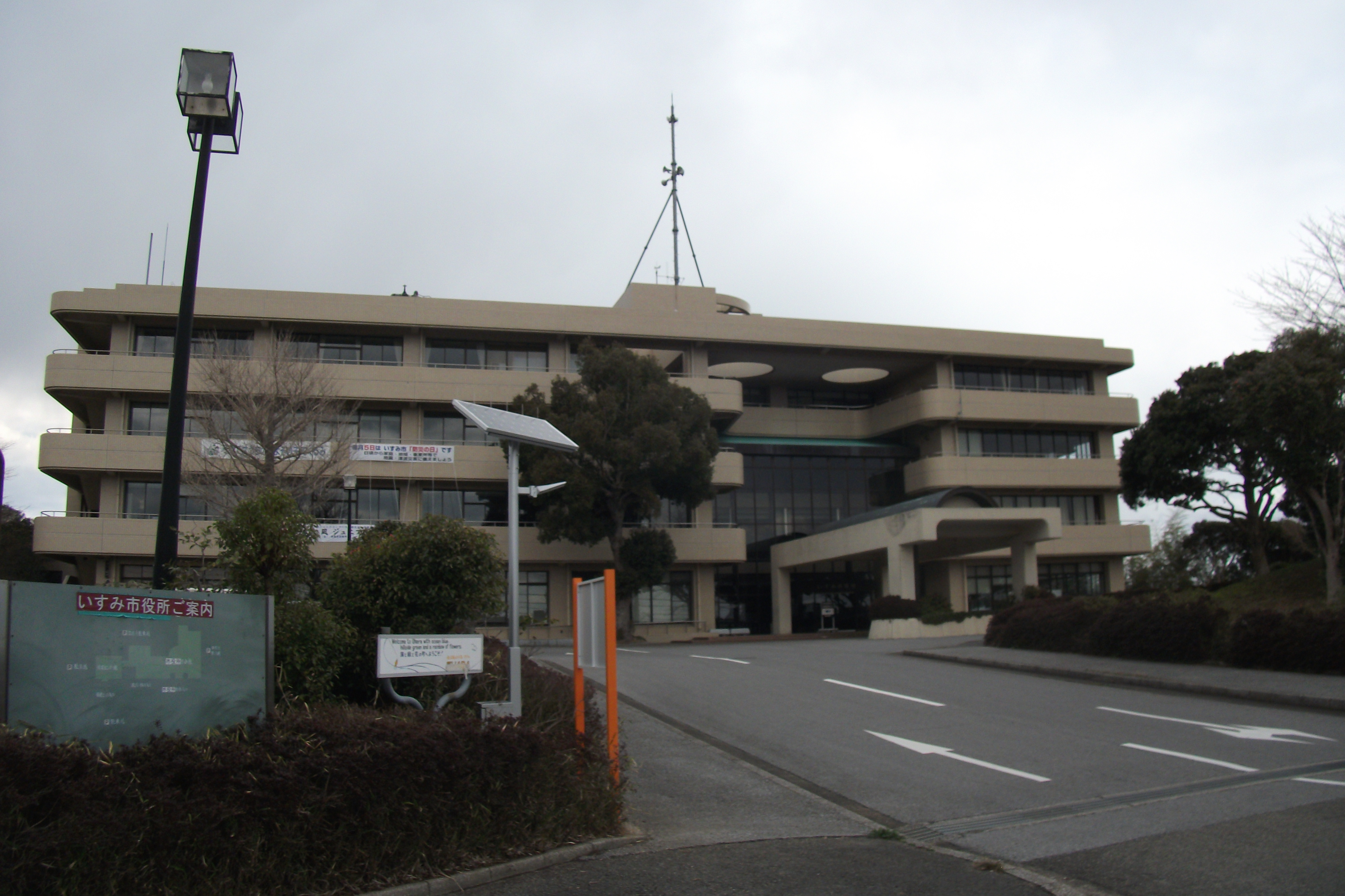 いすみ市役所